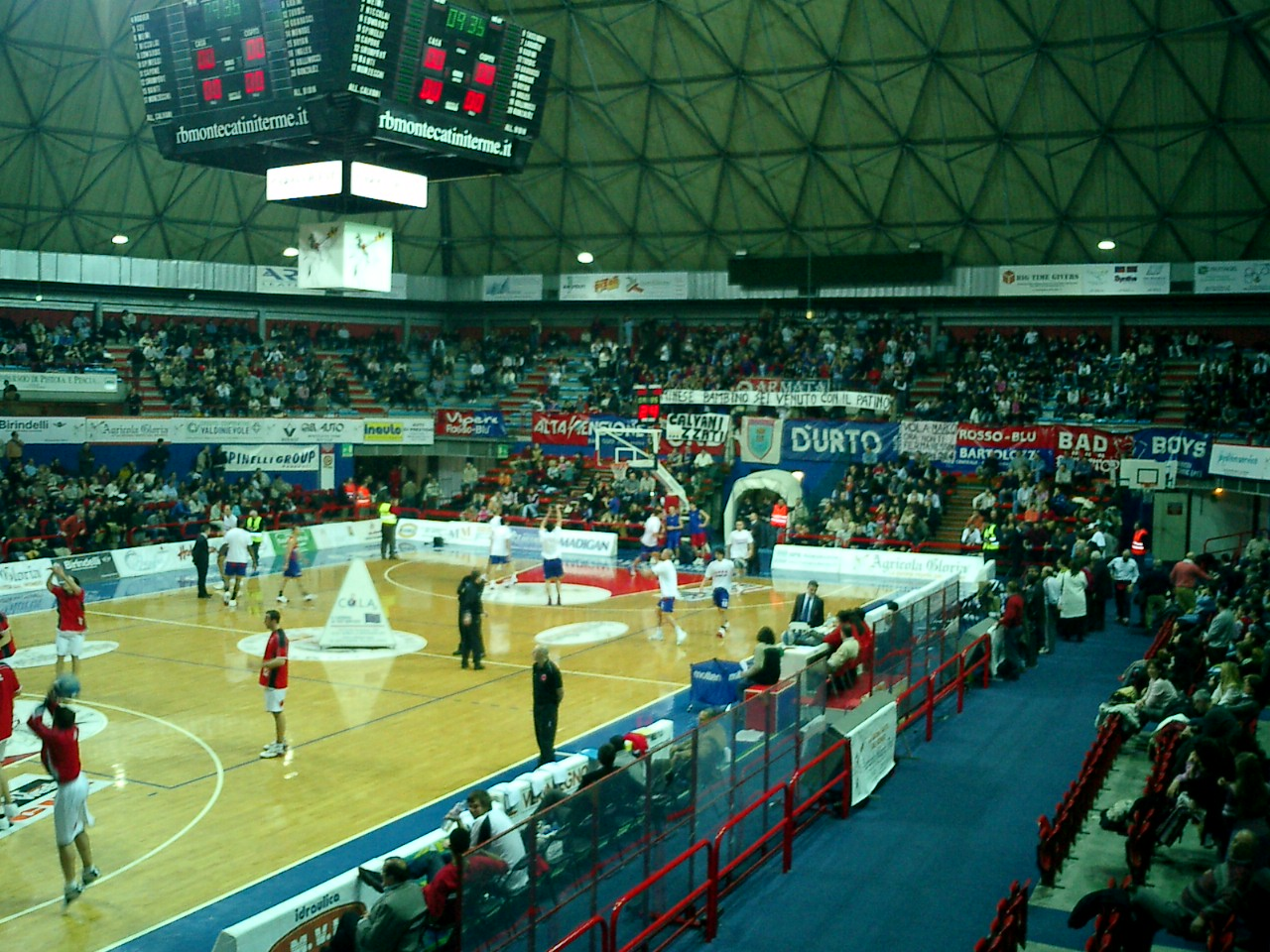 L'interno del PalaMadigan di Montecatini Terme nel febbraio 2004.